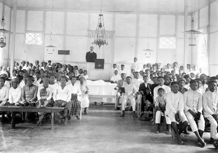 Repronegatief. Avondmaalviering te Poso, Sulawesi.